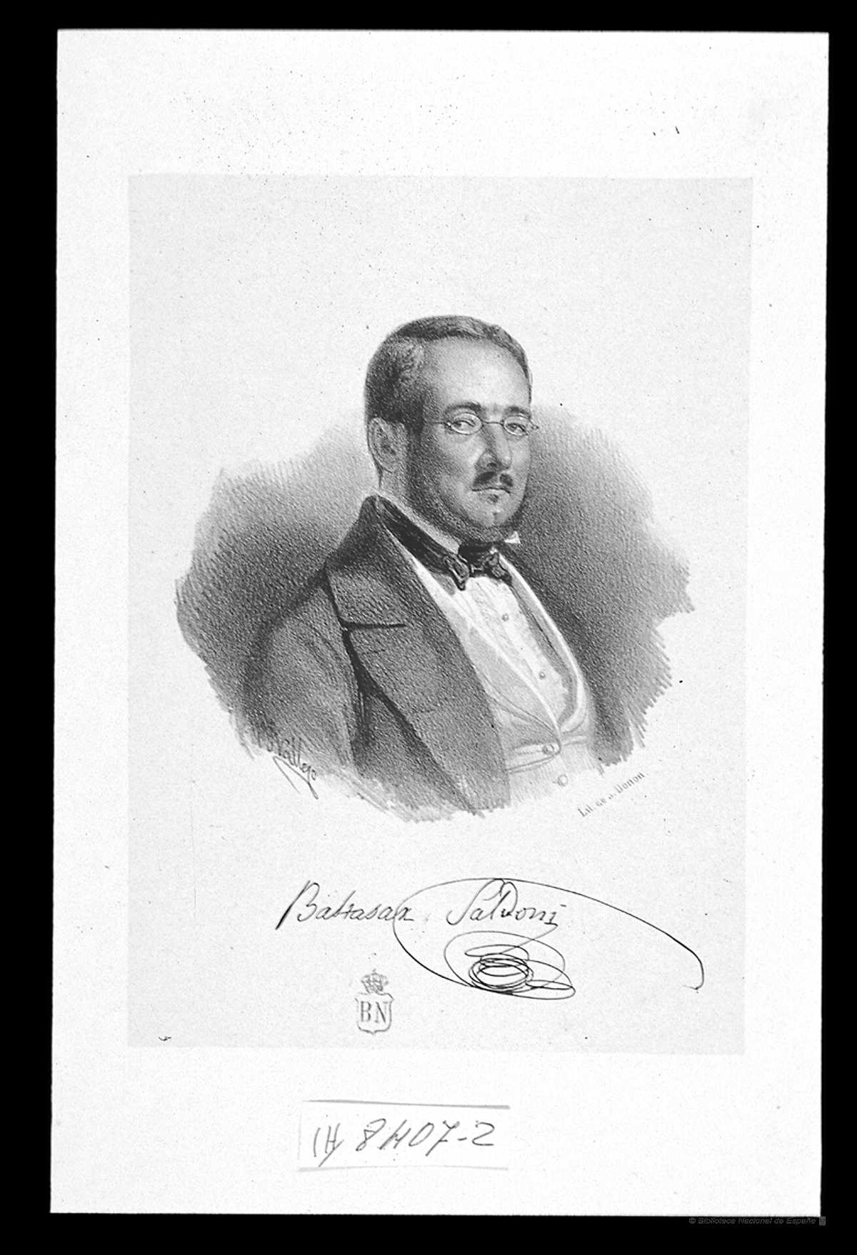 Baltasar Saldoni